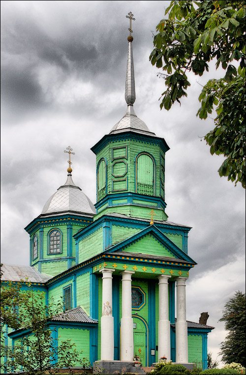 Блонь. Драўляная царква Св. Троіцы